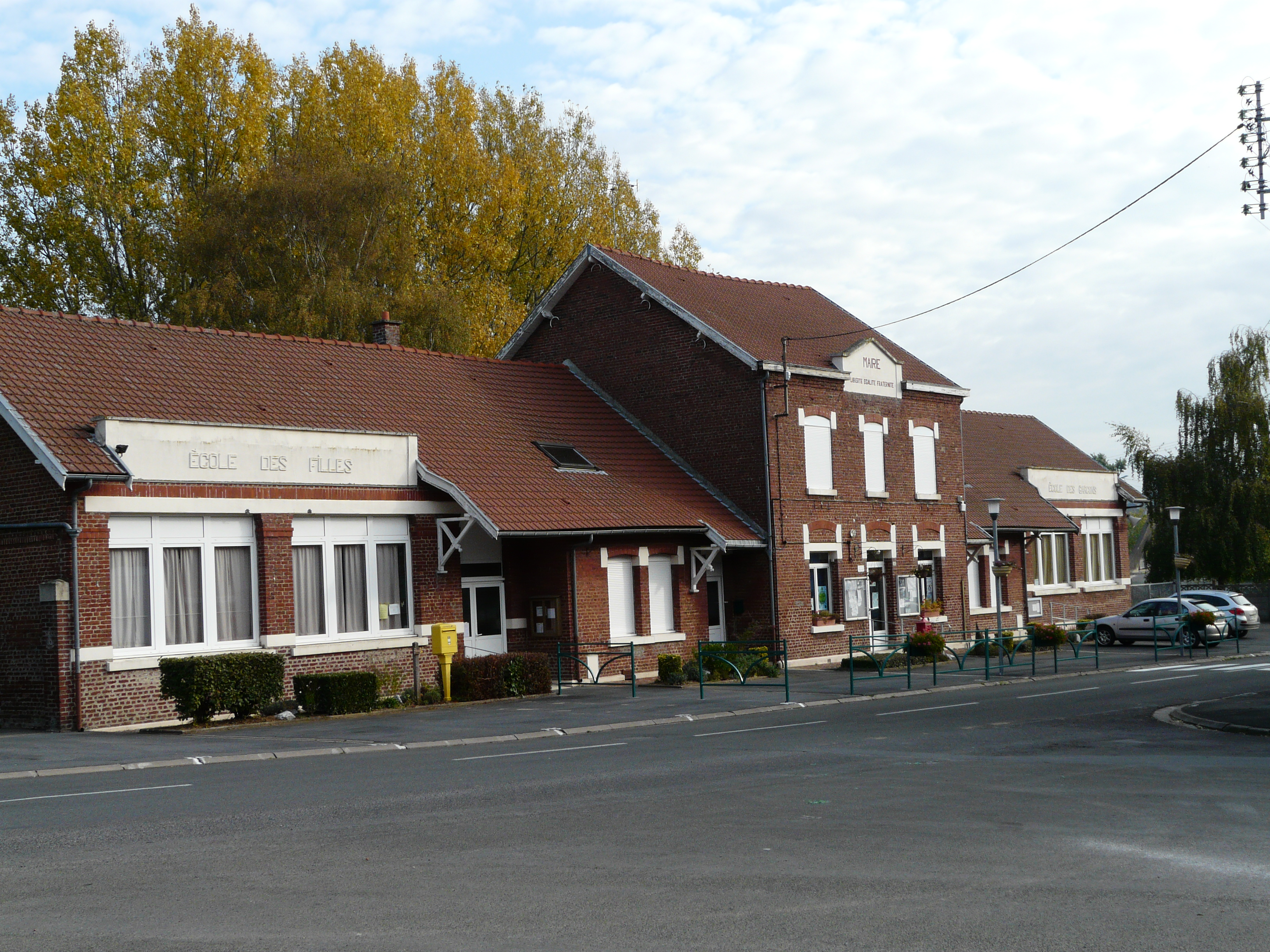 La mairie et les anciennes écoles de filles et de garçons à Banteux (Nord, France)